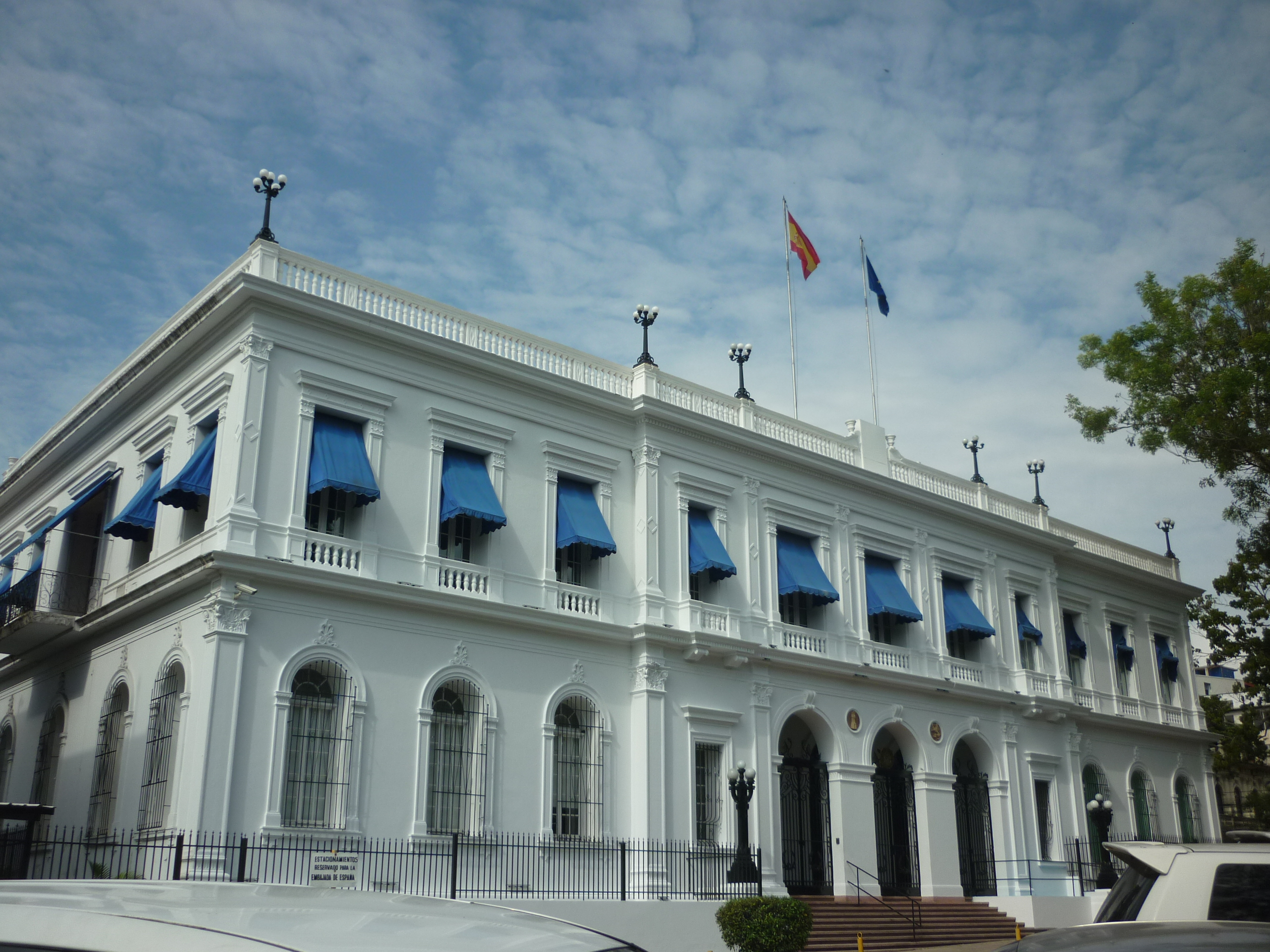 Calidonia, Panamá Rep. de Panamá